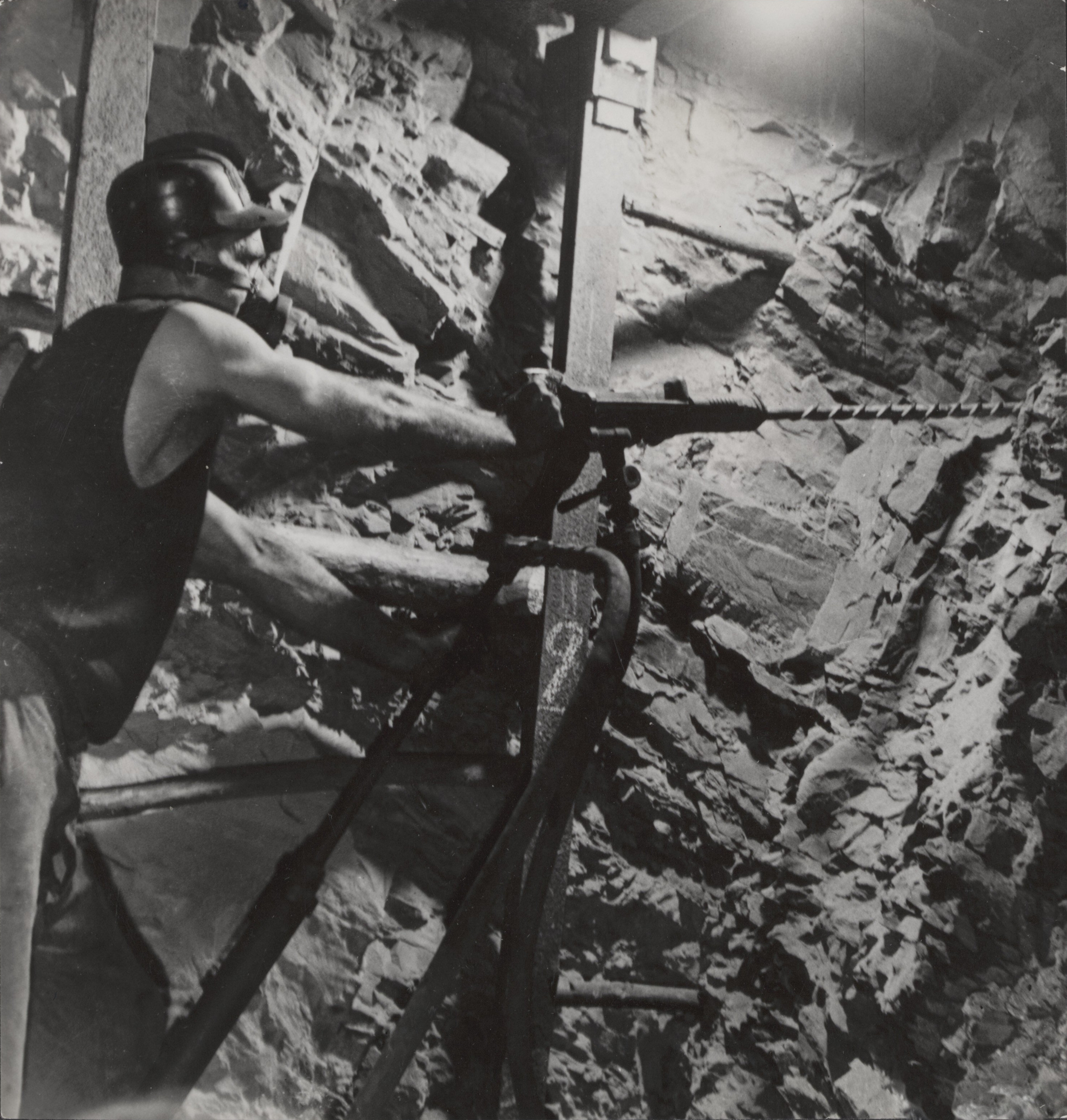 Collectie / Archief : Fotocollectie Elsevier Reportage / Serie : [ onbekend ] Beschrijving : Kolenmijnen Limburg. Mijnwerker met stofmasker boort gaten voor het plaatsen van dynamiet Datum : 21 november 1945 Locatie : Limburg Trefwoorden : mijnbouw, mijnen, mijnwerkers Fotograaf : Blazer, Carel / Anefo Auteursrechthebbende : Nationaal Archief Materiaalsoort : Foto (zwart/wit) Nummer archiefinventaris : bekijk toegang 2.24.05.02 Bestanddeelnummer : 033-1092